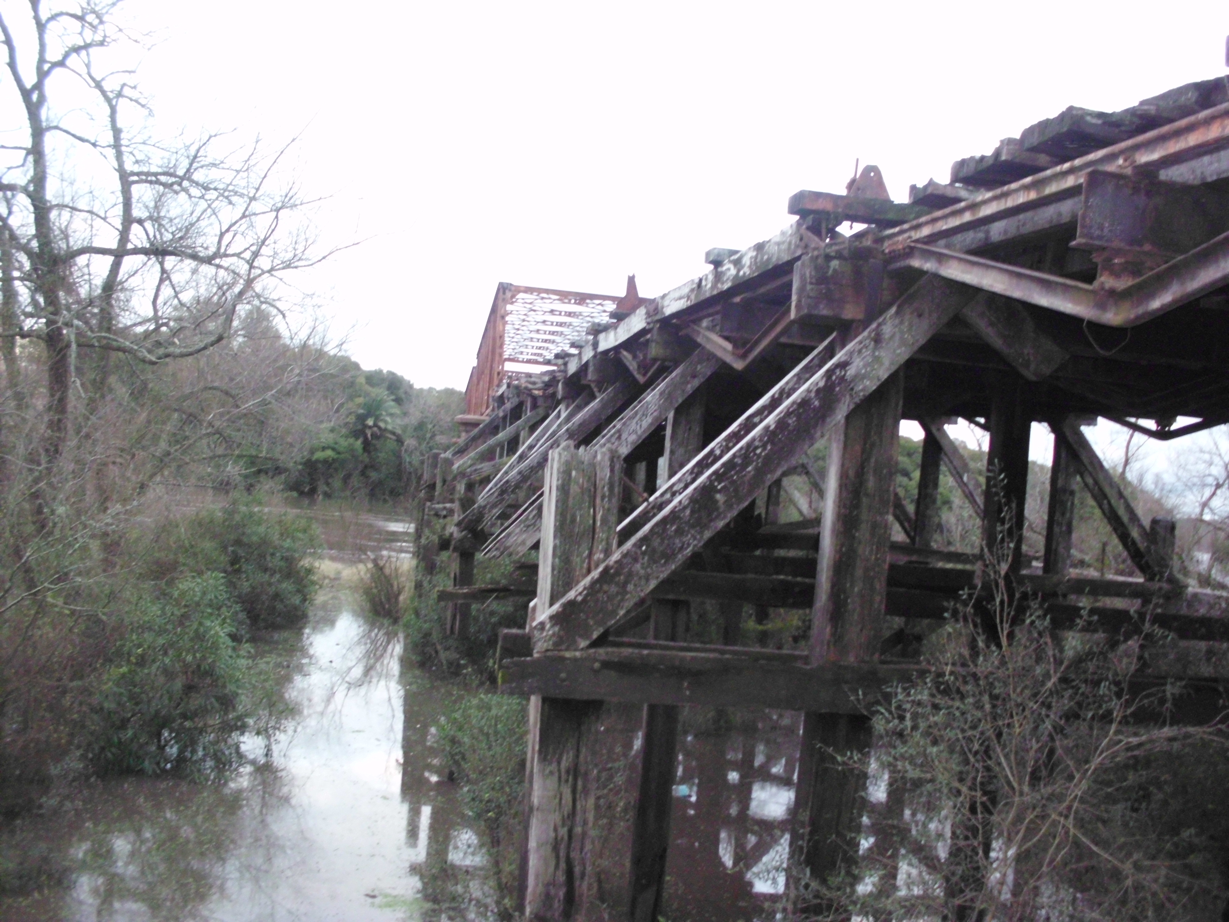 Vista desde abajo, desde el río Santa Lucía (2012)